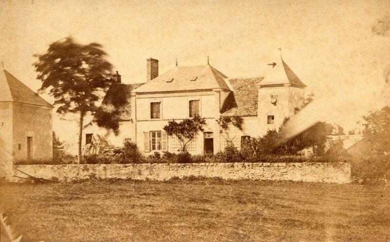 La Cure, à Couargues, en août 1874.